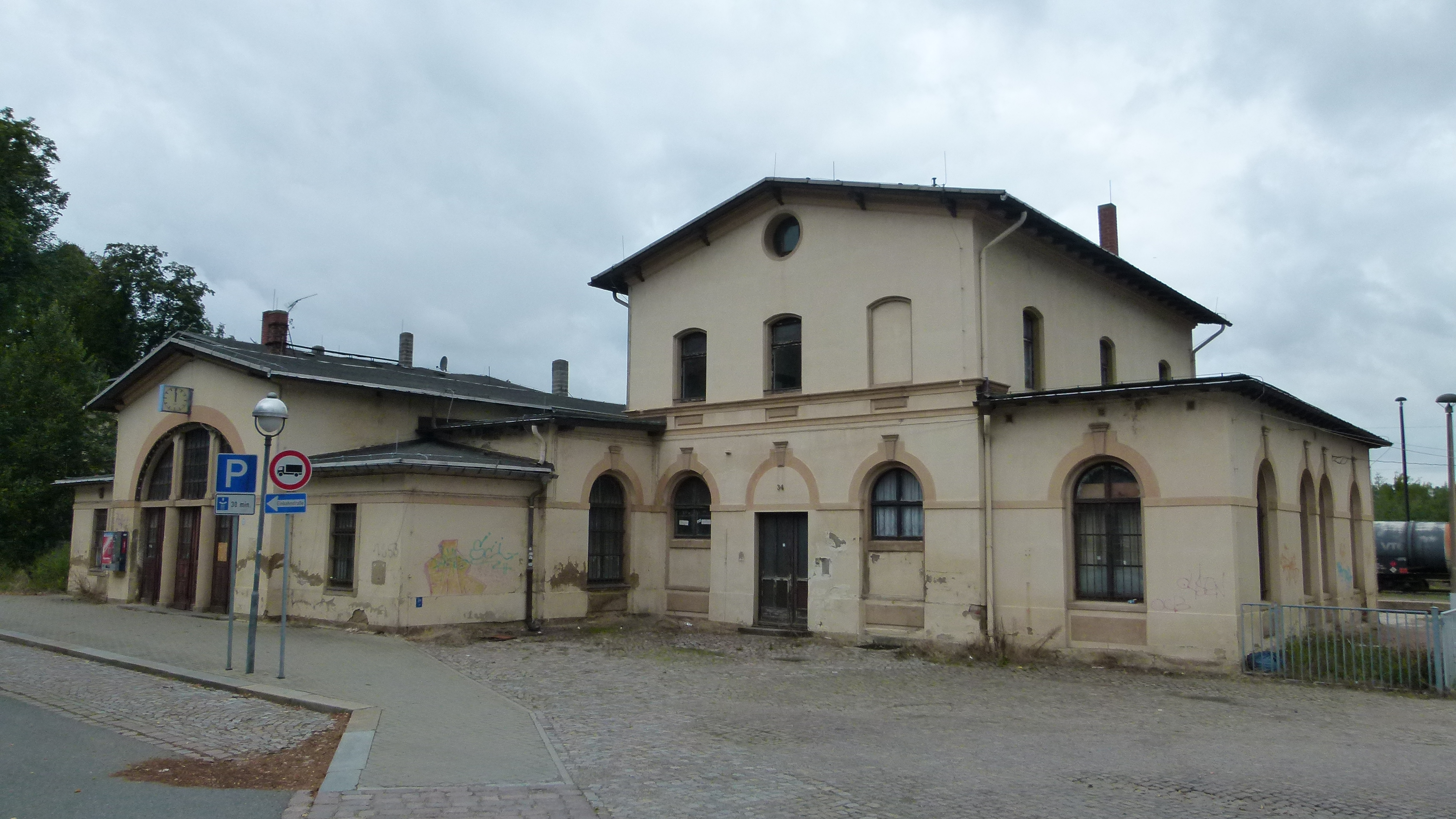 Denkmalgeschützter Bahnhof Nossen, Sachsen